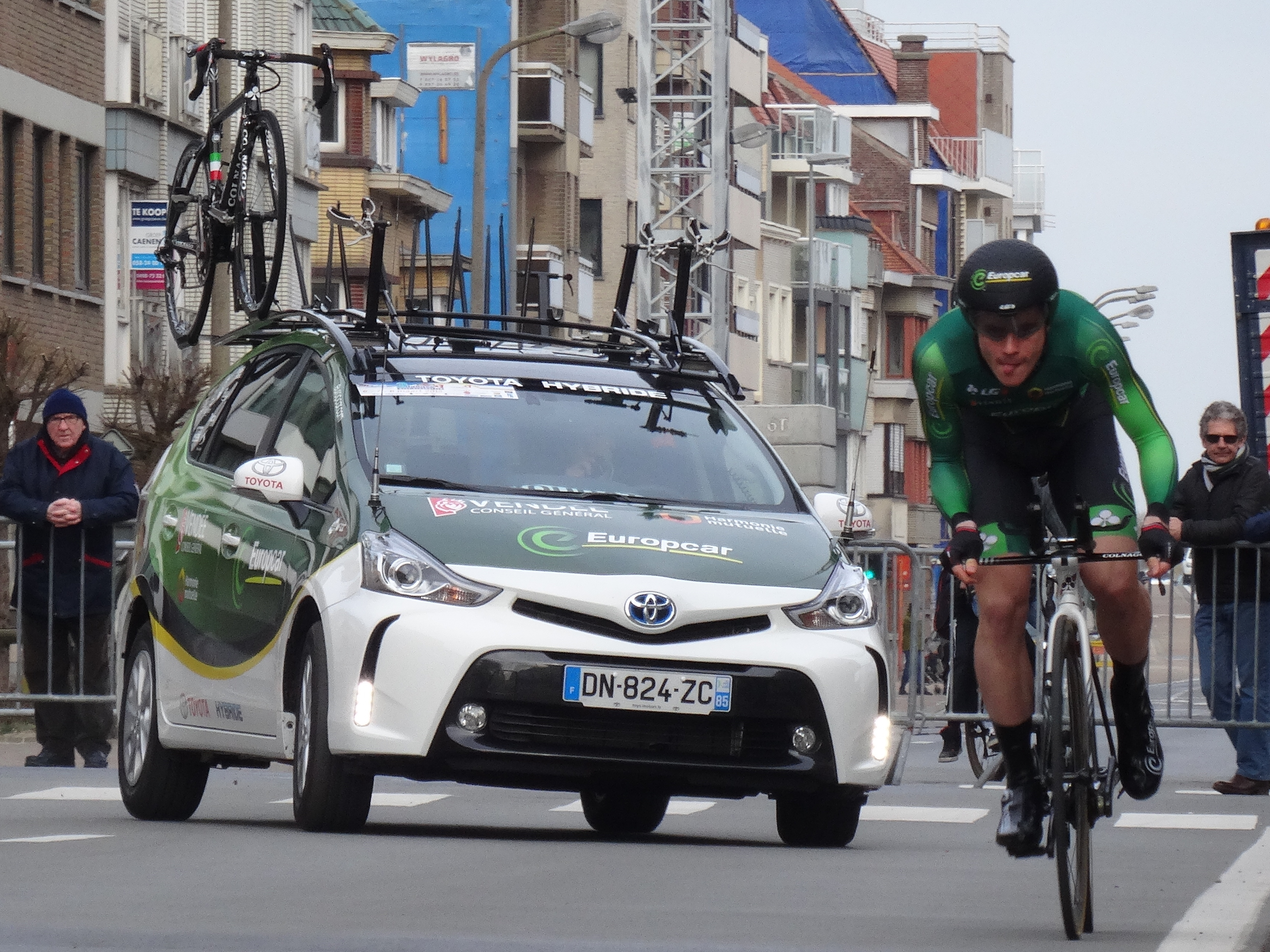 Reportage réalisé le vendredi 6 mars à l'occasion du contre-la-montre individuel du prologue des Trois jours de Flandre-Occidentale 2015 à Middelkerke, Belgique.